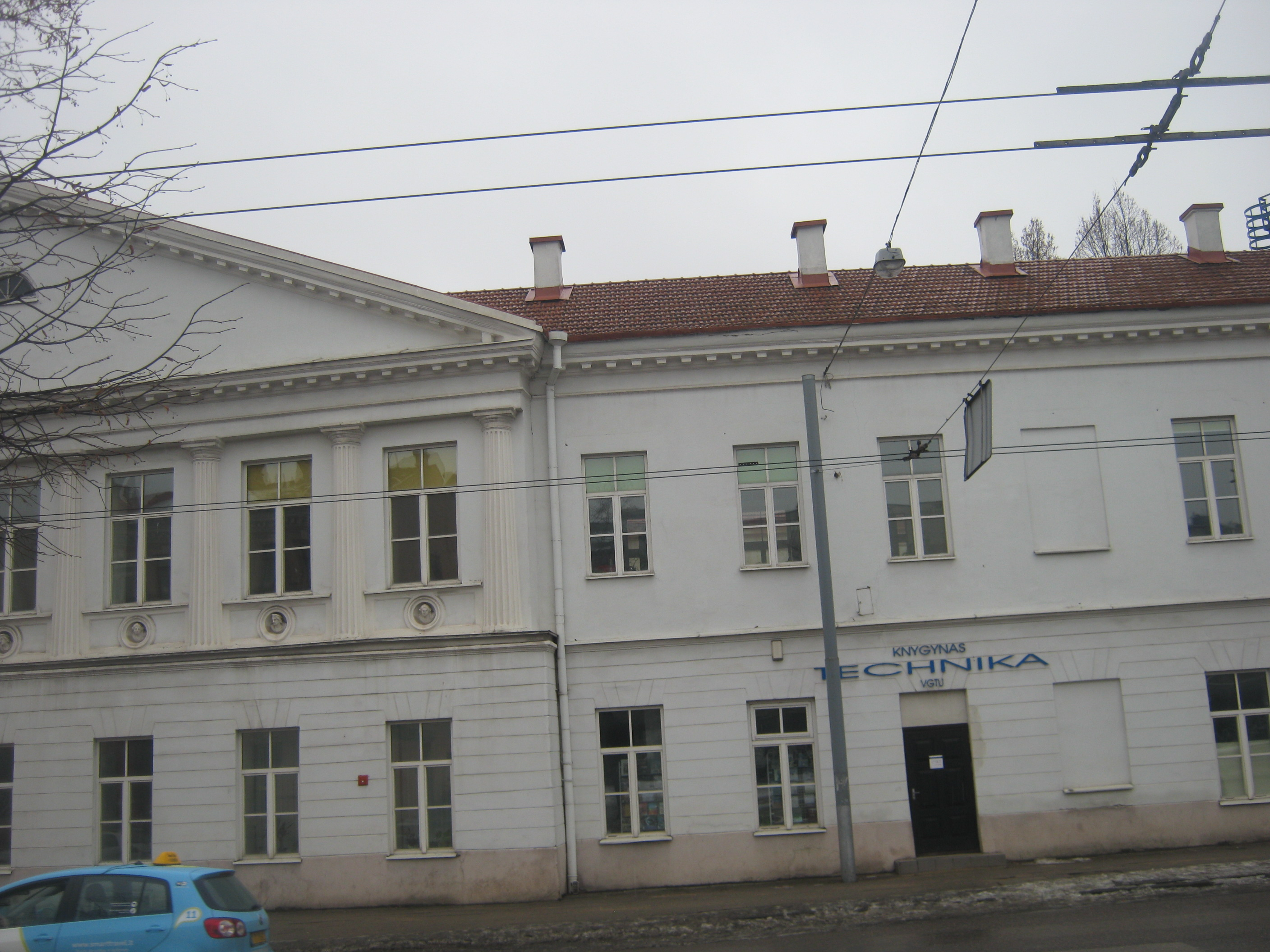 Technika. Vilnius